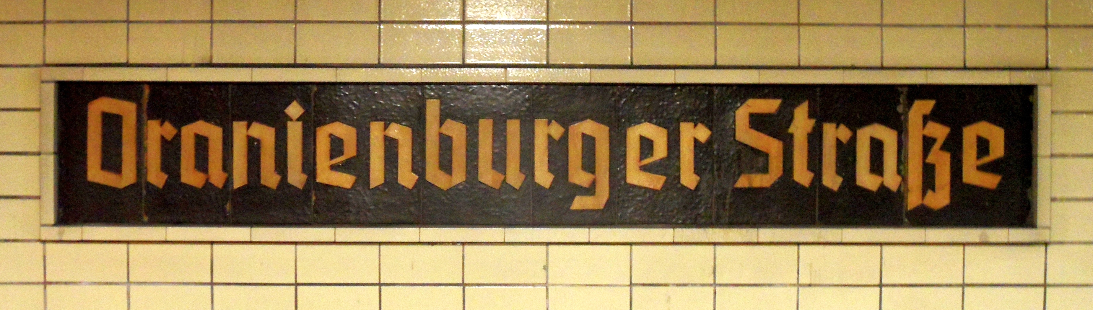 Berlin - S-Bahnhof Oranienburger Straße - Linien S1,S2,S25